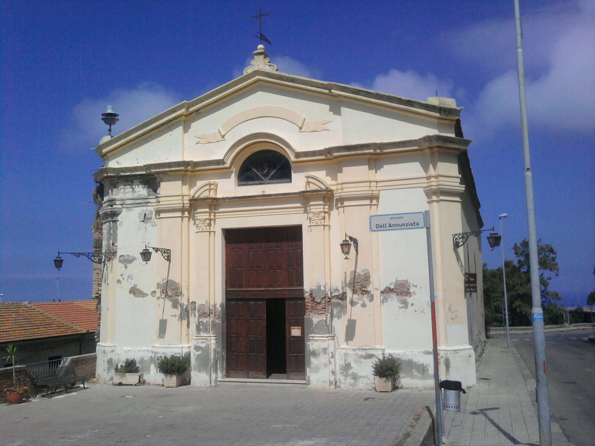 Facciata della chiesa del Santissimo Crocifisso a Palmi.